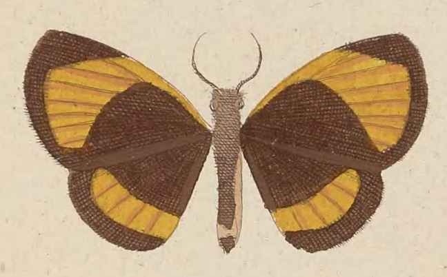 Callidula evander (Stoll, 1780)